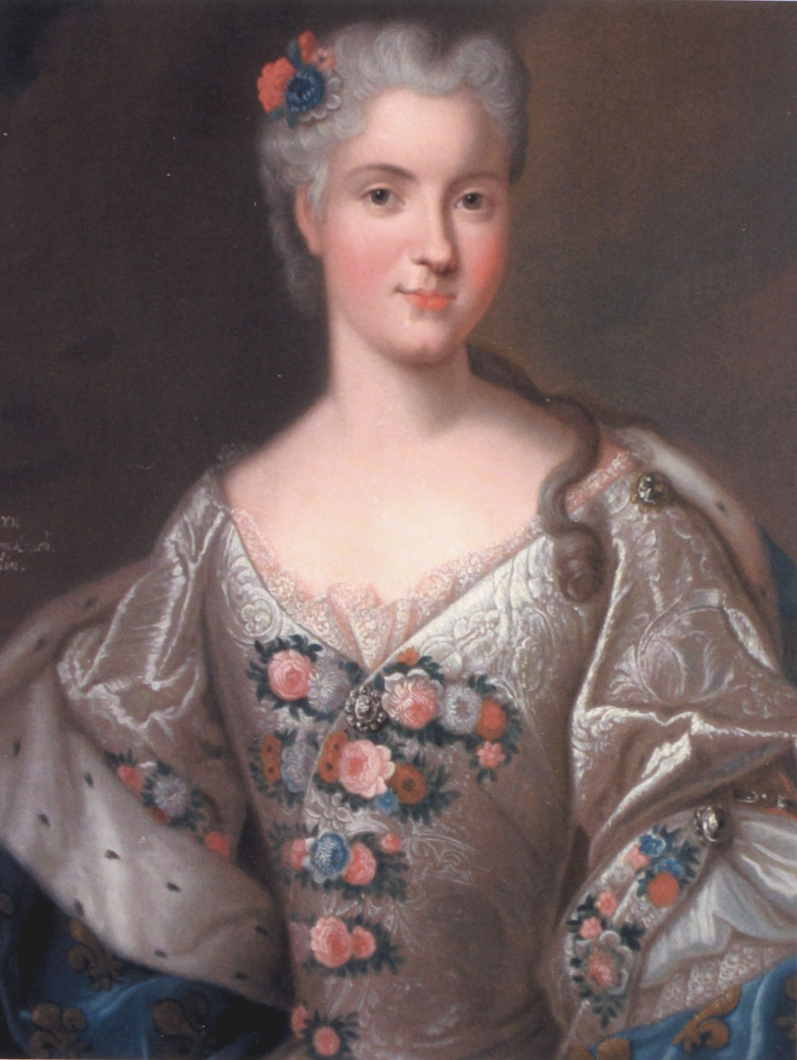 Portrait of Marie Leszczyńska (1703-1768)label QS:Len,"Portrait of Marie Leszczyńska (1703-1768)" label QS:Lhe,"מריה לשצ'ינסקה בשנת 1725"